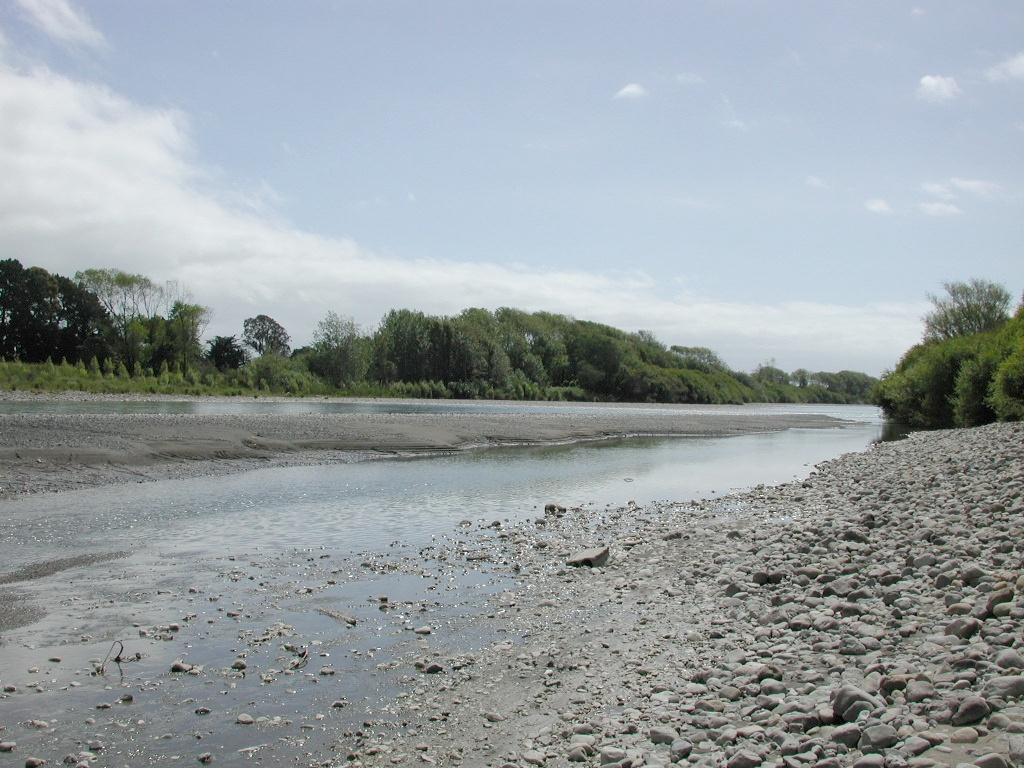 Otaki River in Otaki, New Zealand.